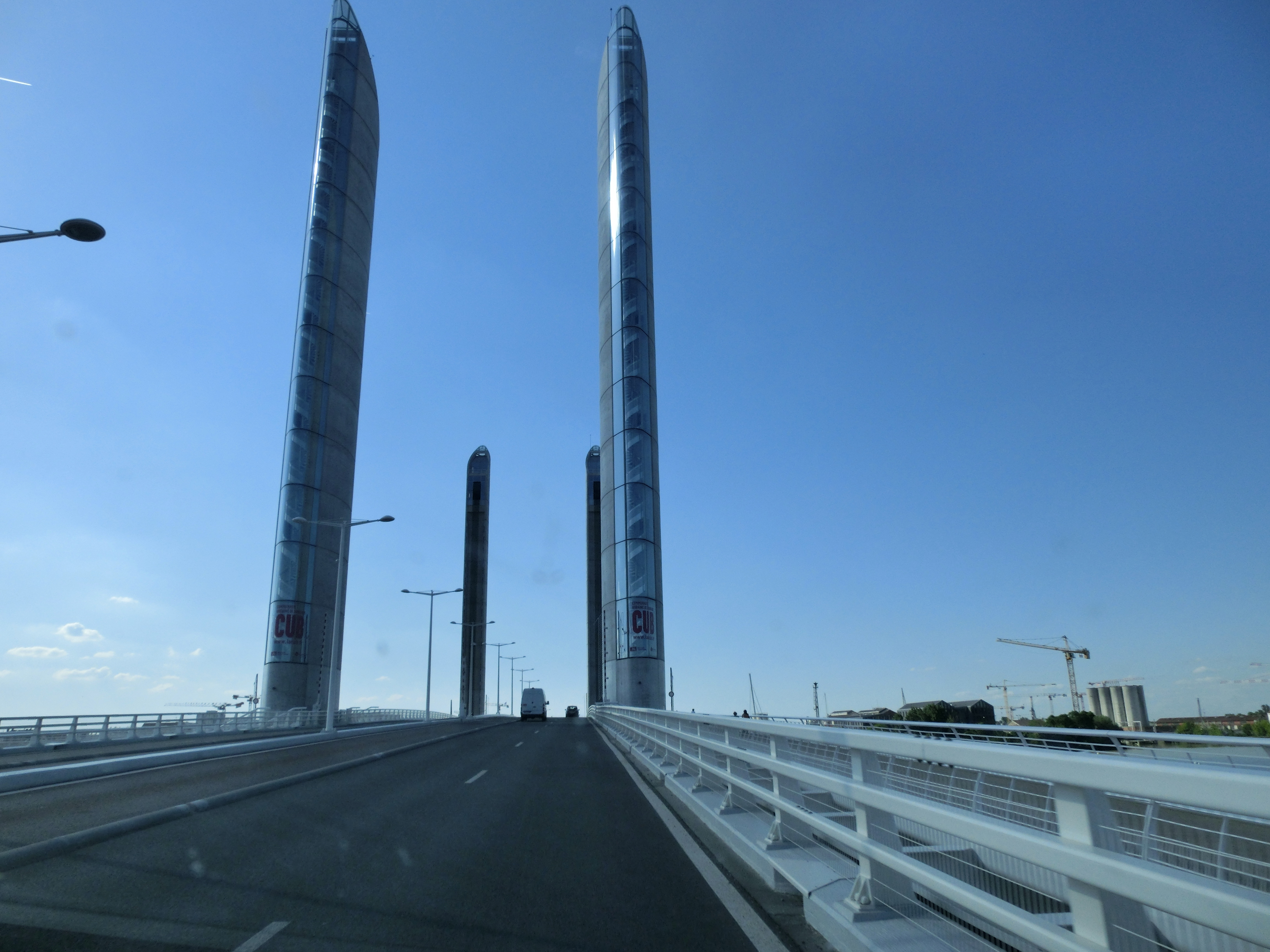 Traversée du pont Jacques Chaban-Delmas de Bordeaux.